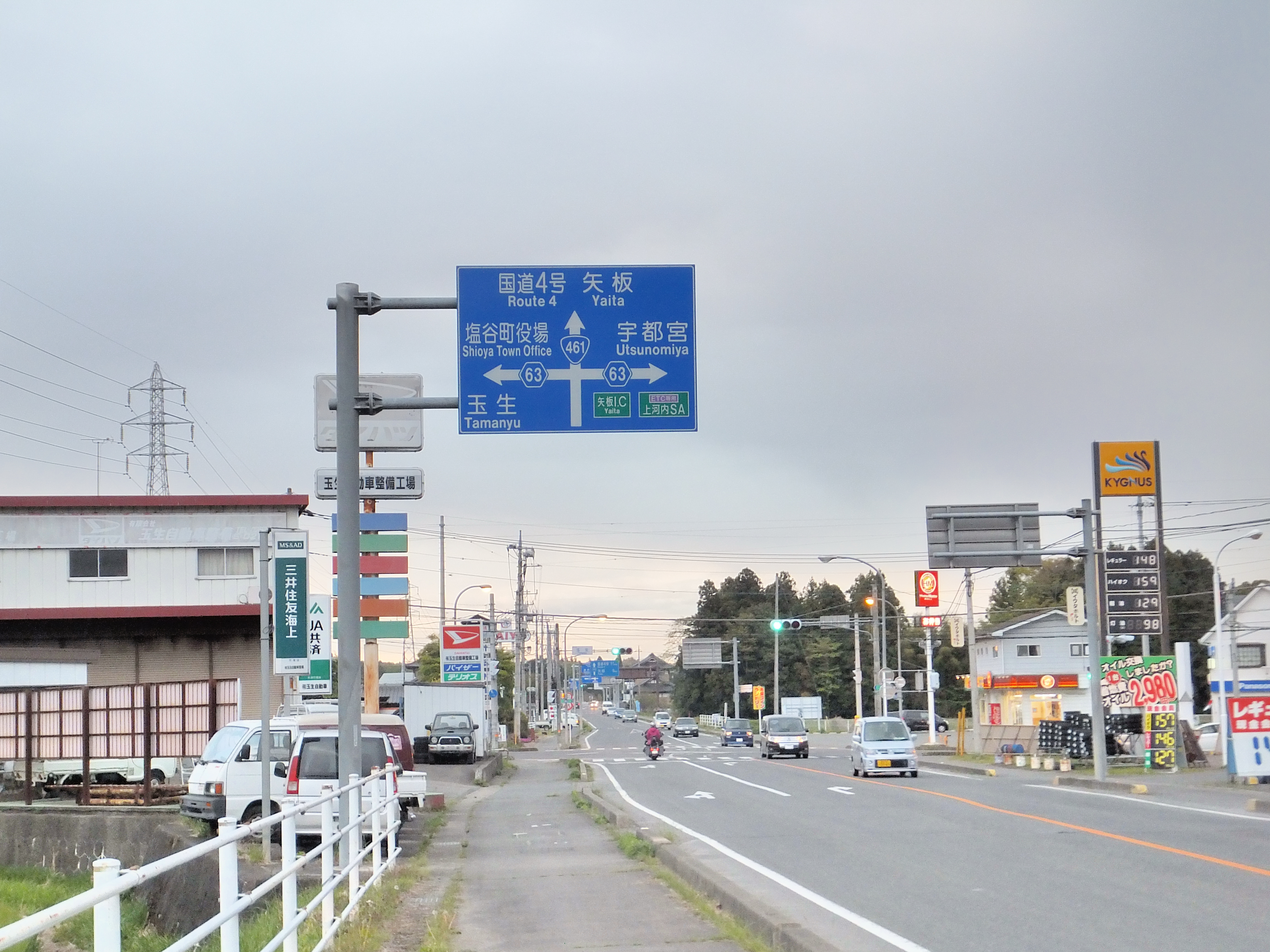 国道461号（塩谷町内にて）